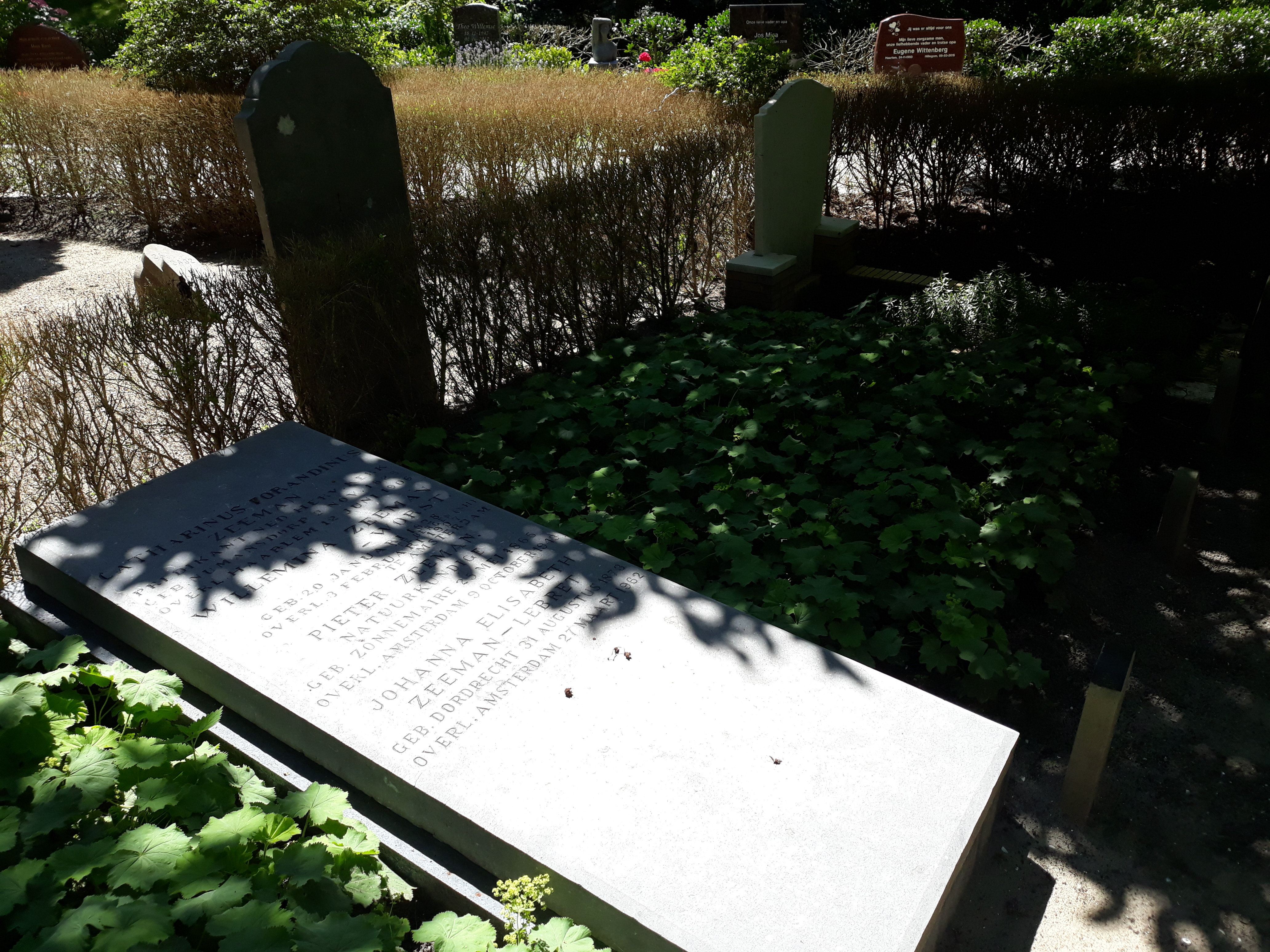 Das Grab des niederländischen Naturwissenschaftlers (Physiker) und Nobelpreisträgers Physik Pieter Zeeman im Famileingrab auf dem Allgemeen Begraafplats Kleverlaan in Haarlem.